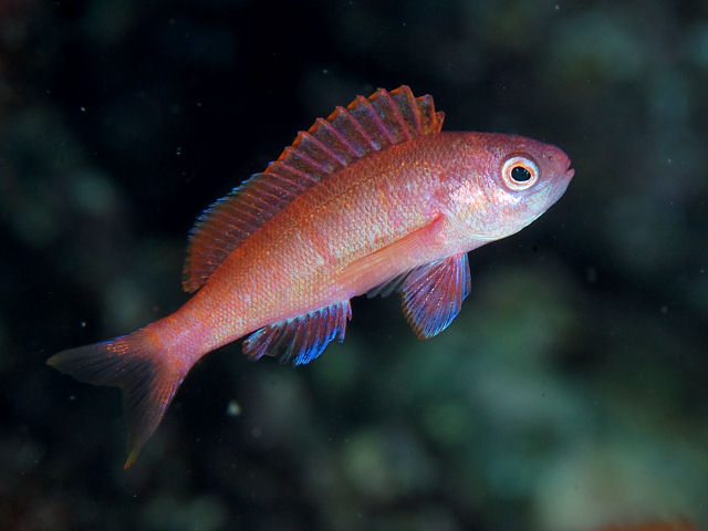 ホカケハナダイyg Rabaulichthys suzukii